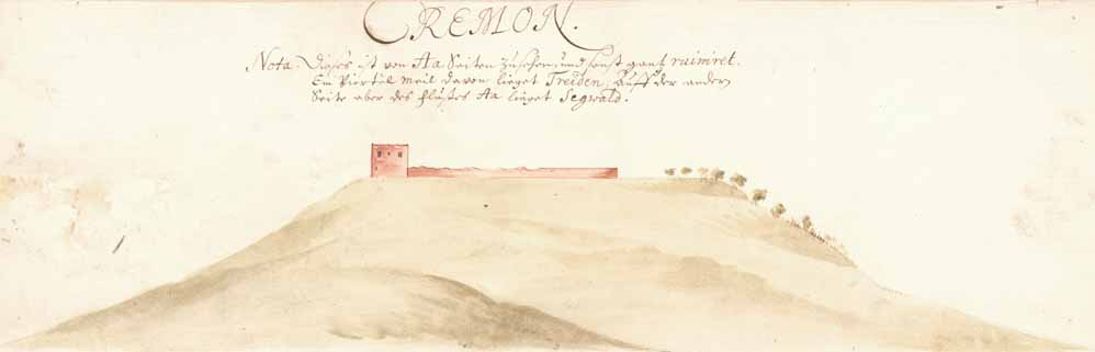 Vaade piiskopilinnusele idast, Koiva jõe poolt. Joonistus XVII sajandist, Rootsi Sõjaarhiiv.